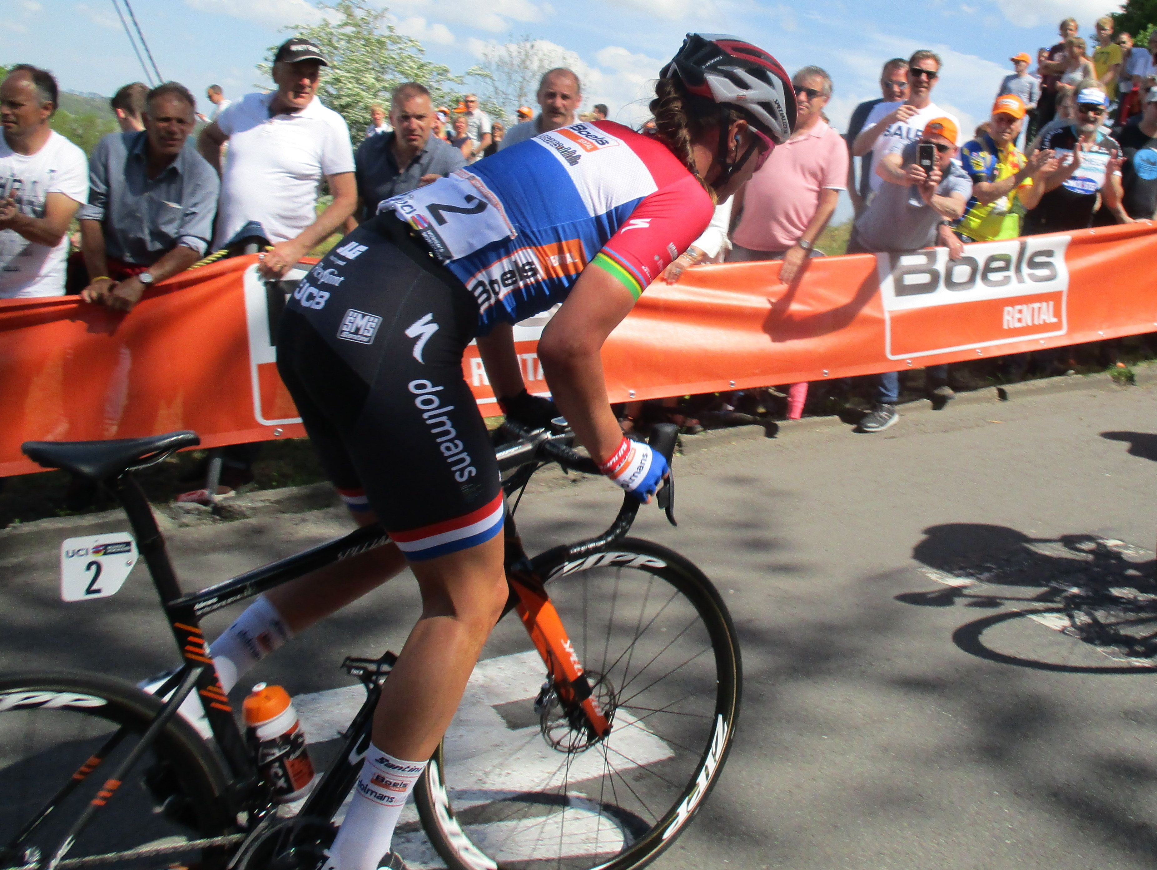 Eerste passage van de Waalse Pijl 2019 voor vrouwen op de Mur de Huy